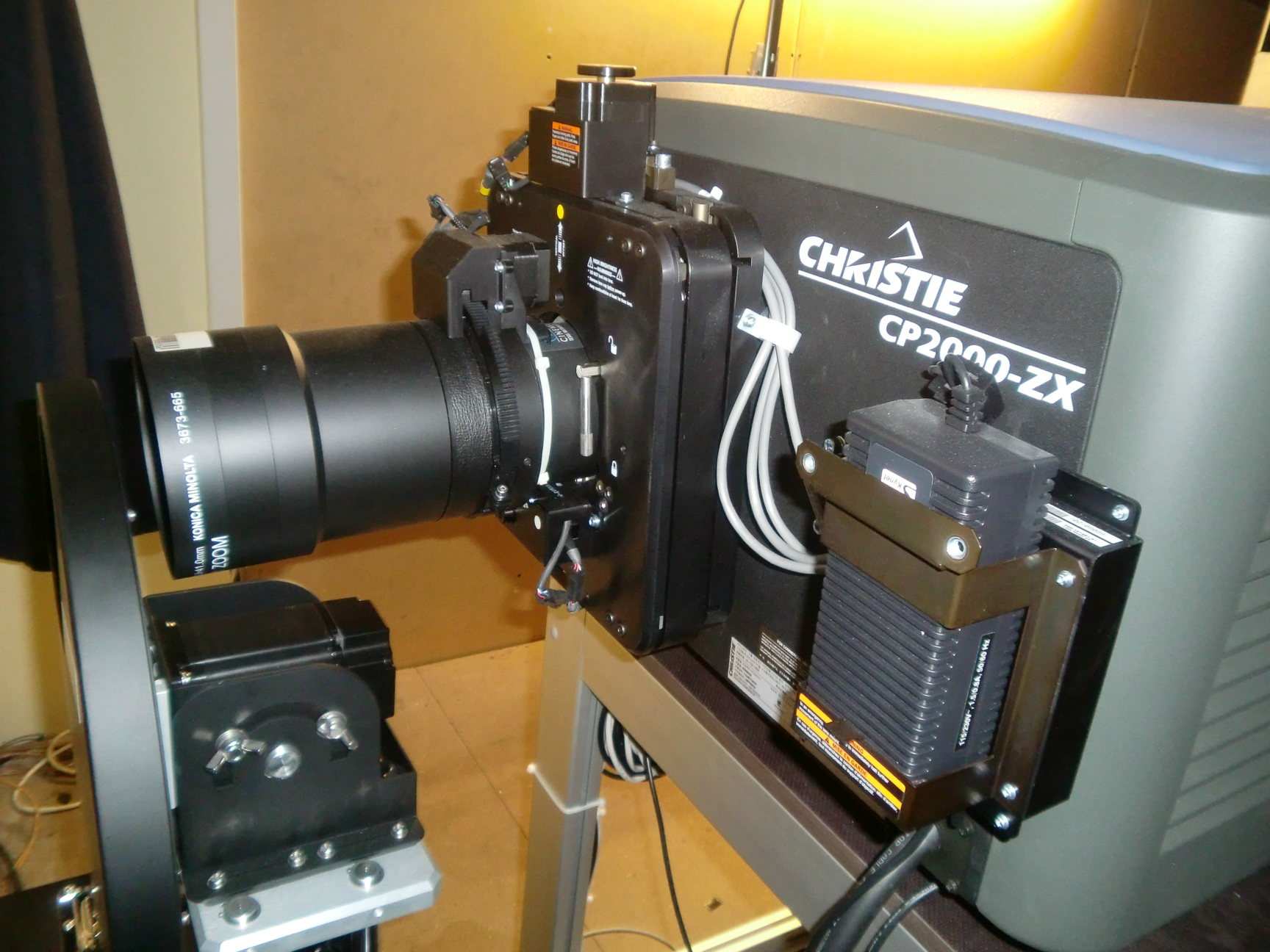 Digitaler Kinoprojektor Christie